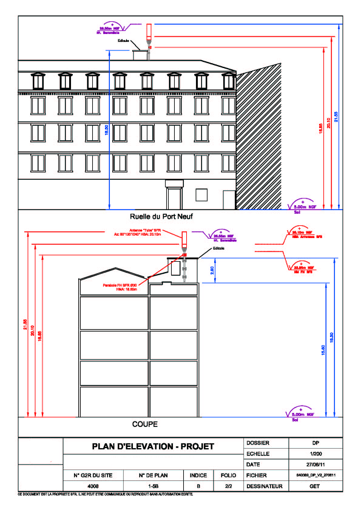 Plan antennes sur batiments